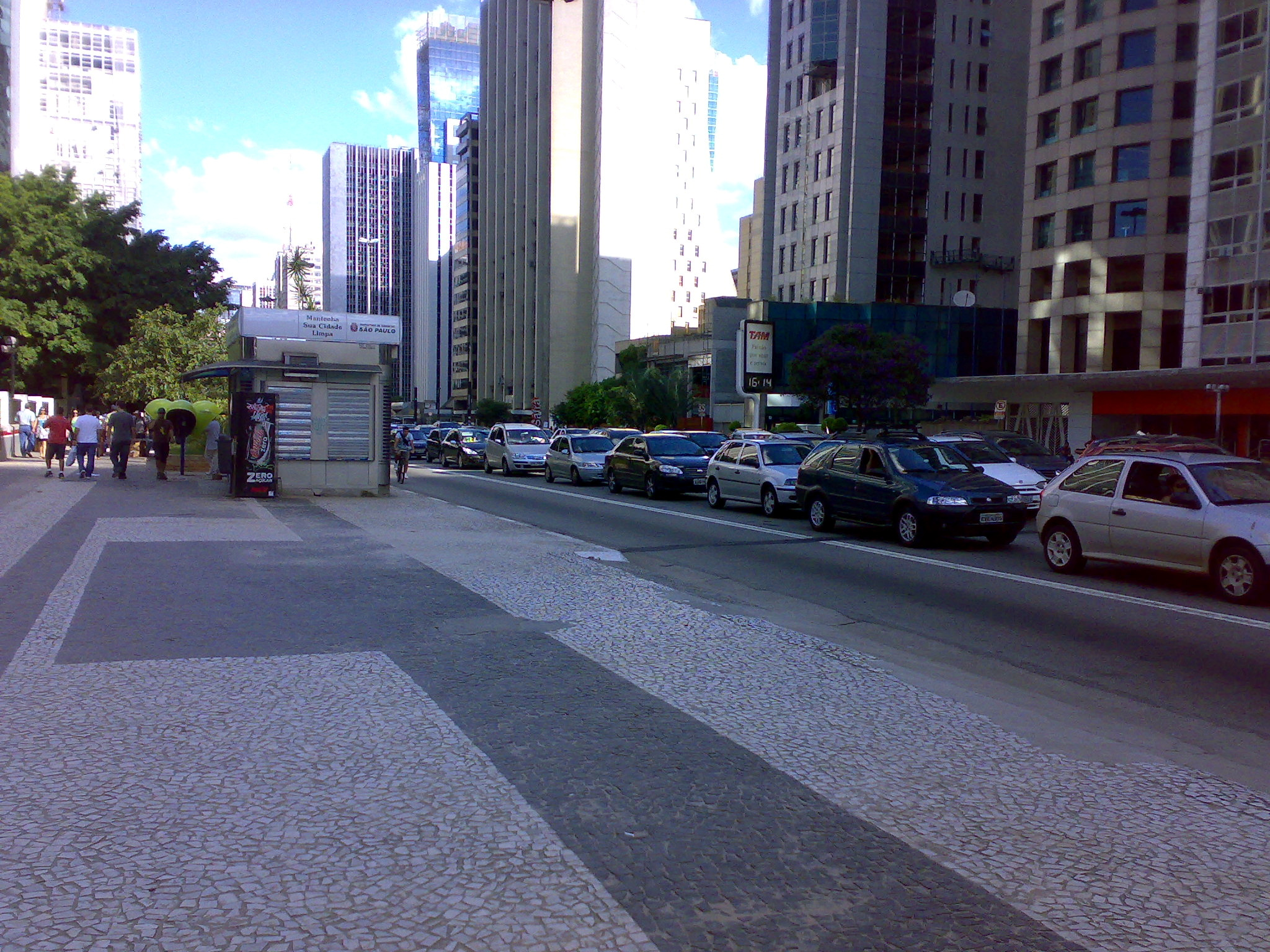 Portuguese pavement in Paulista Av. São Paulo